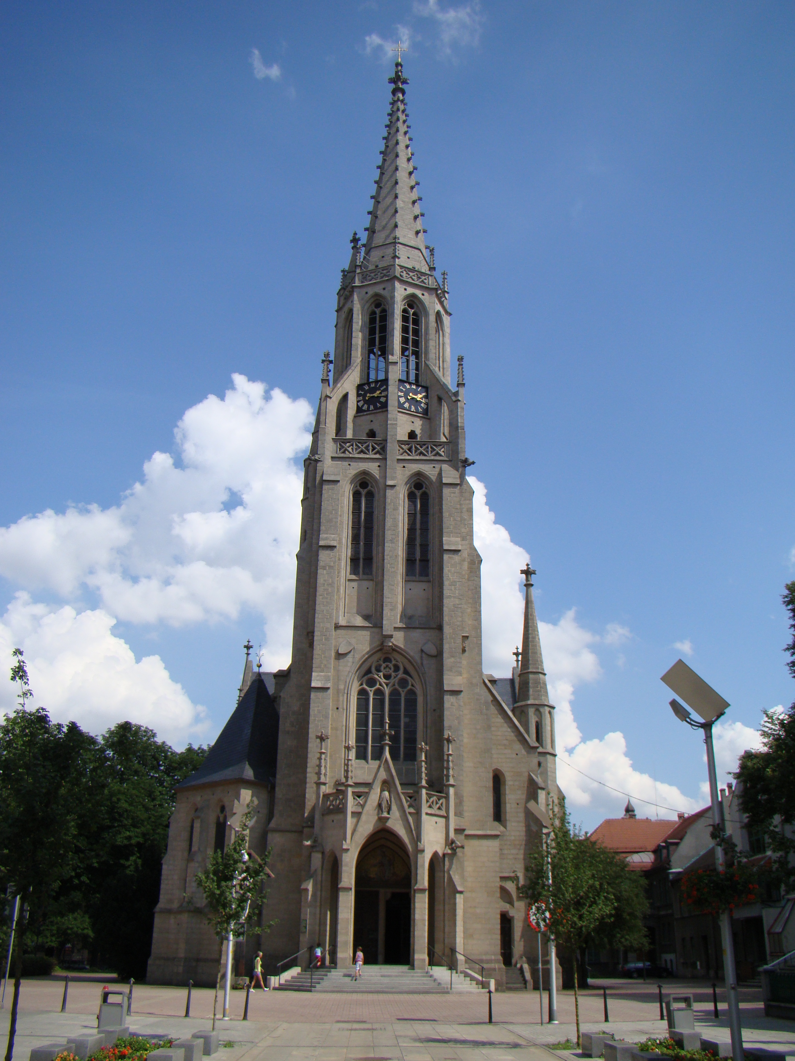 Katowice, kościół parafialny pw. Niepokalanego Poczęcia NPM, 1862-1870